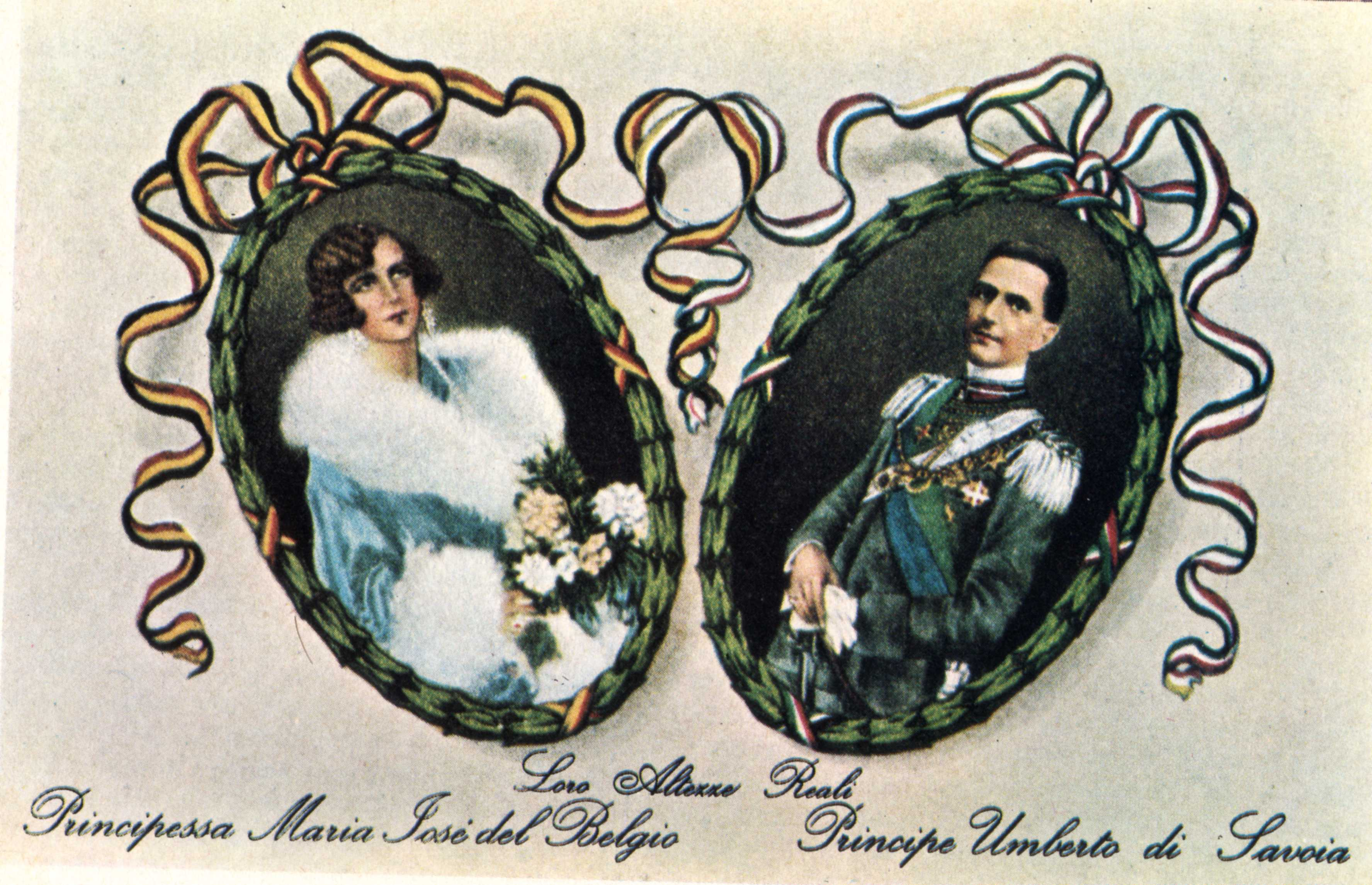 Cartolina edita in occasione delle nozze tra Umberto di Savoia, erede al trono d'italia, e Maria Josè del Belgio